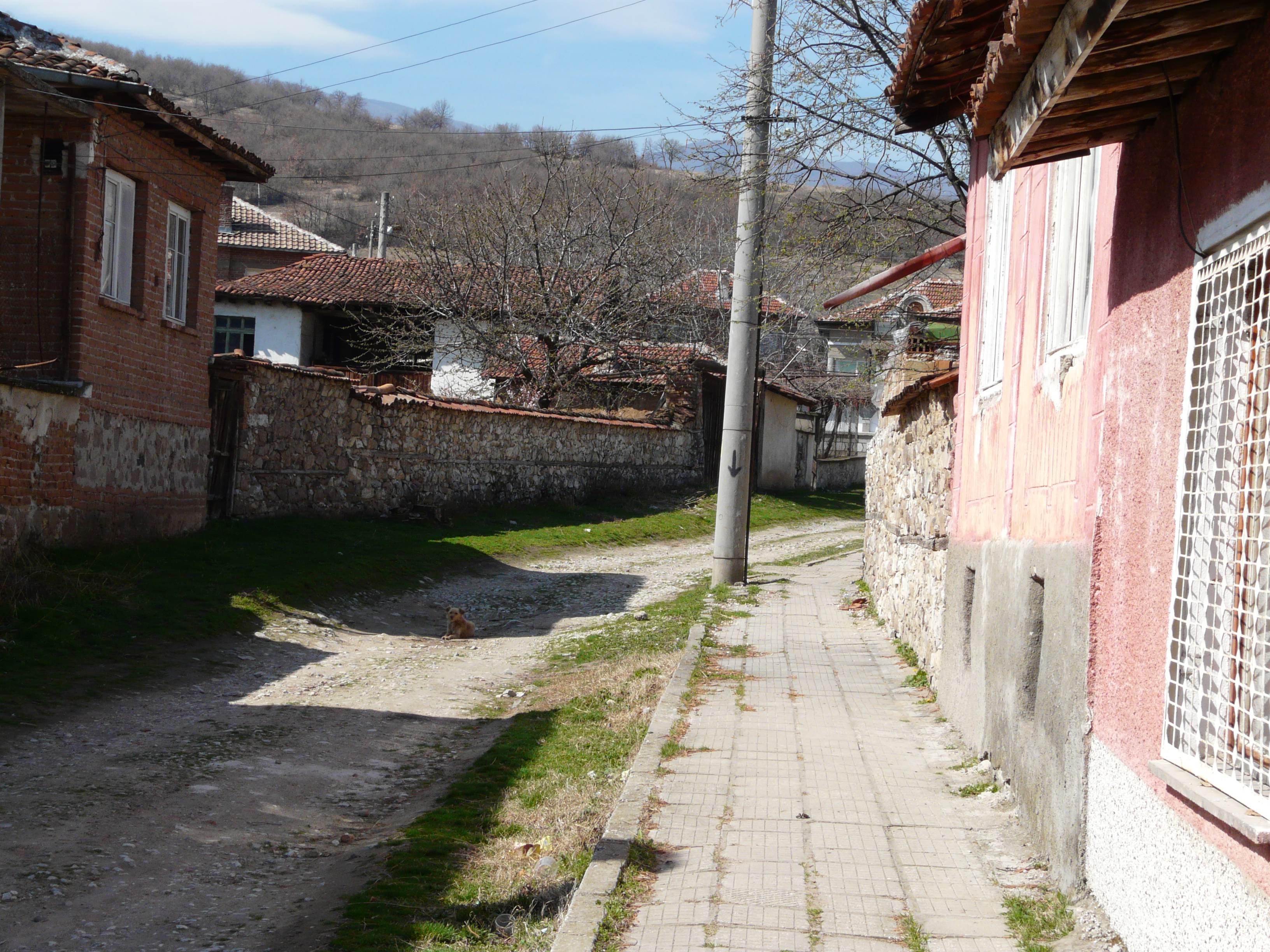 Дебращянска улица. Видими са къщите на Тинкови, Пешеви, Кавалджиеви иКузеви.